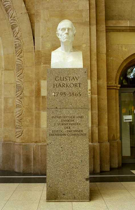 Gustav Harkort-Denkmal in Leipzig Fotograph: André Loh-Kliesch Standort: auf dem Leipziger Hauptbahnhof Hinweis: vom Autor auch in [1] verwendet, keine URV!